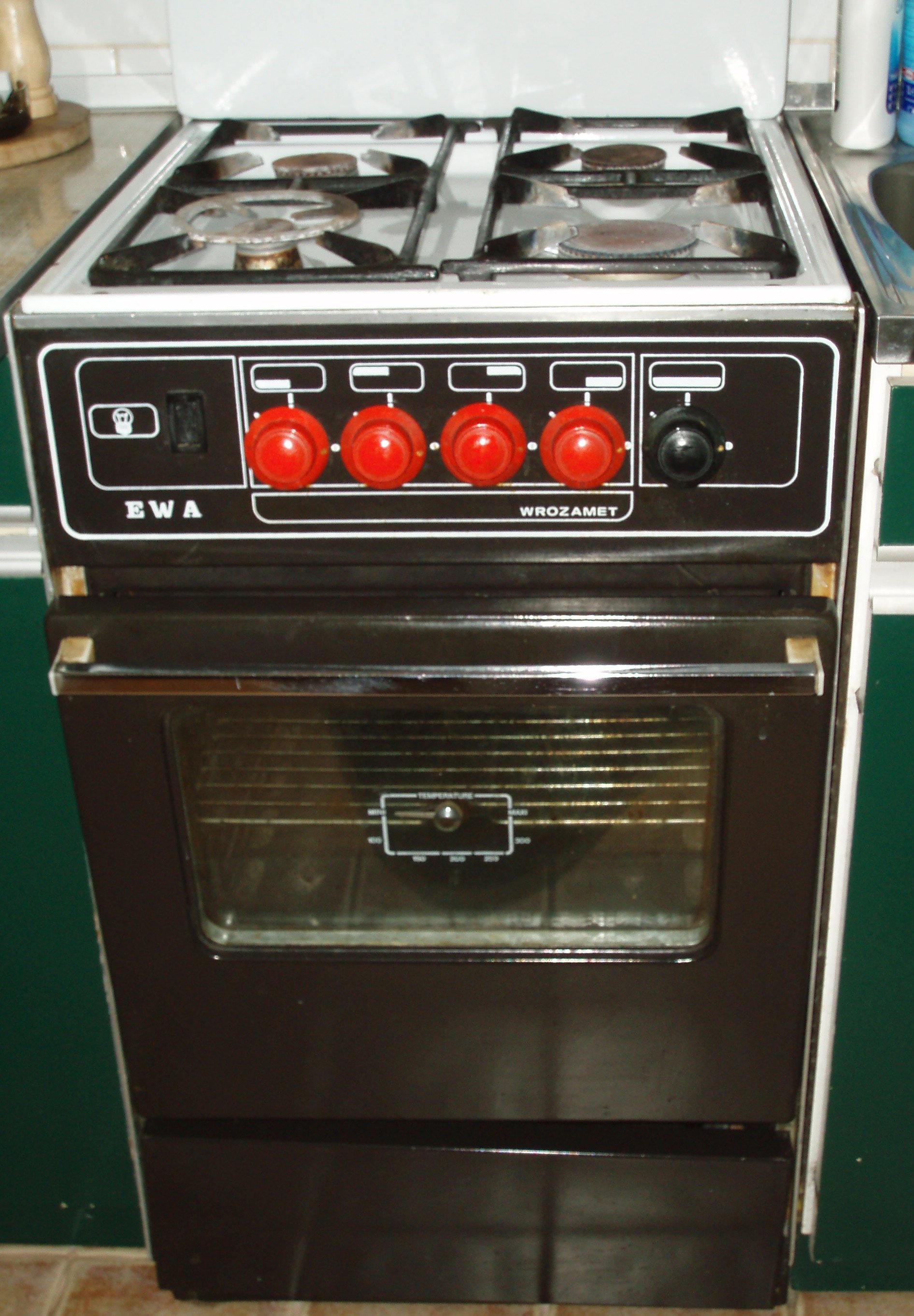 Kuchenka